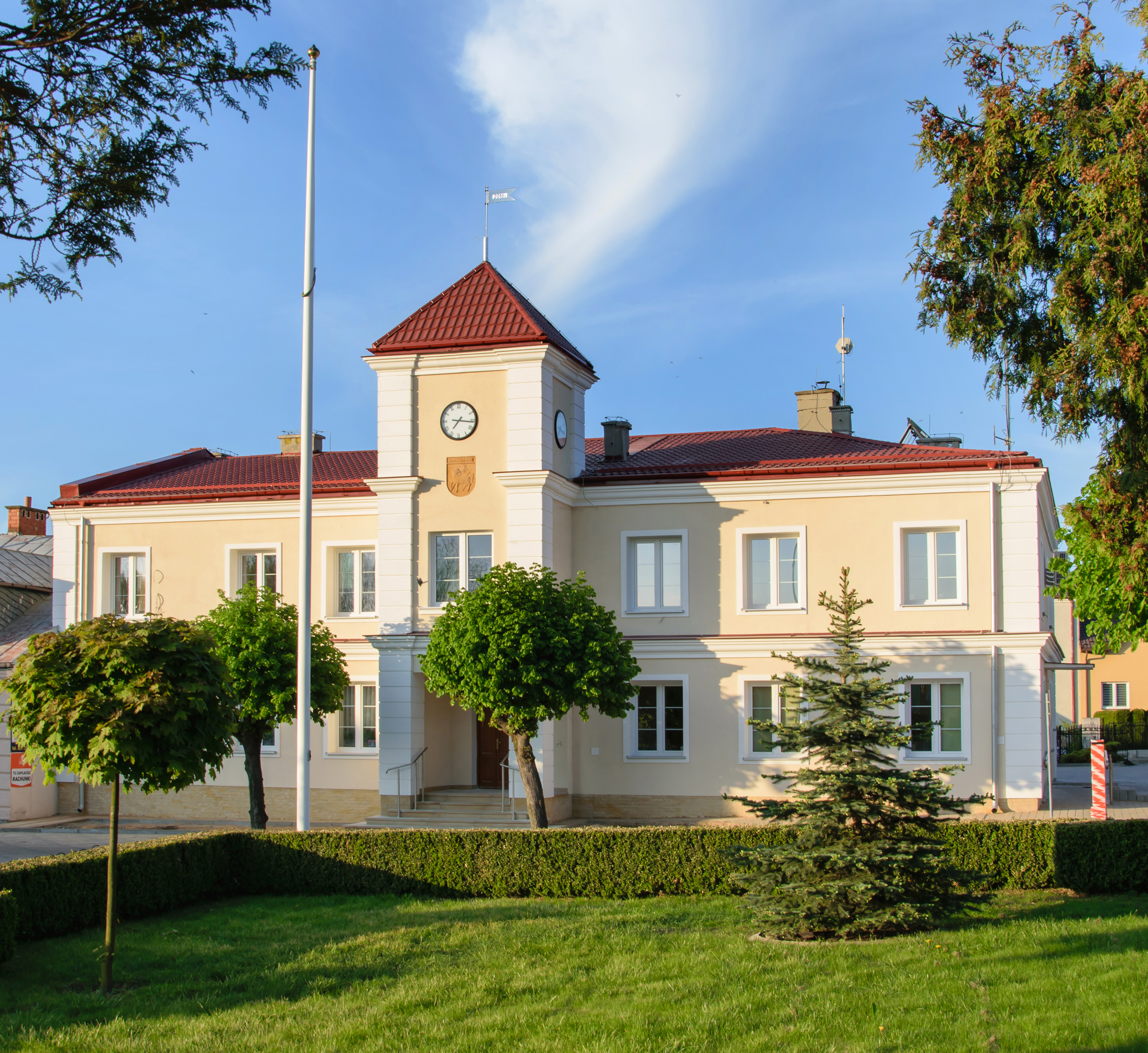 Urząd Miejski w Urzędowie